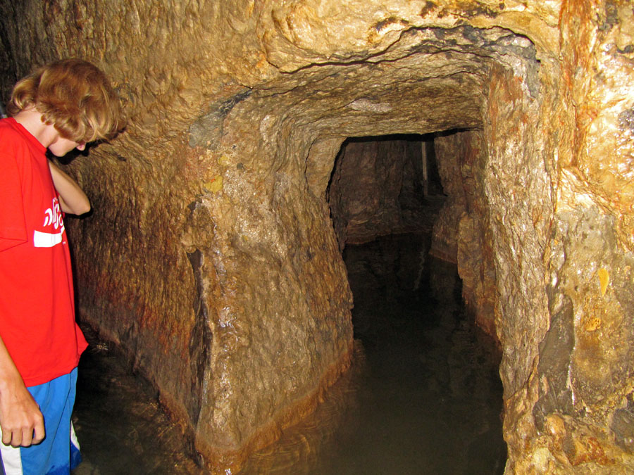 Hezekiah's Tunnel נקבת השילוח